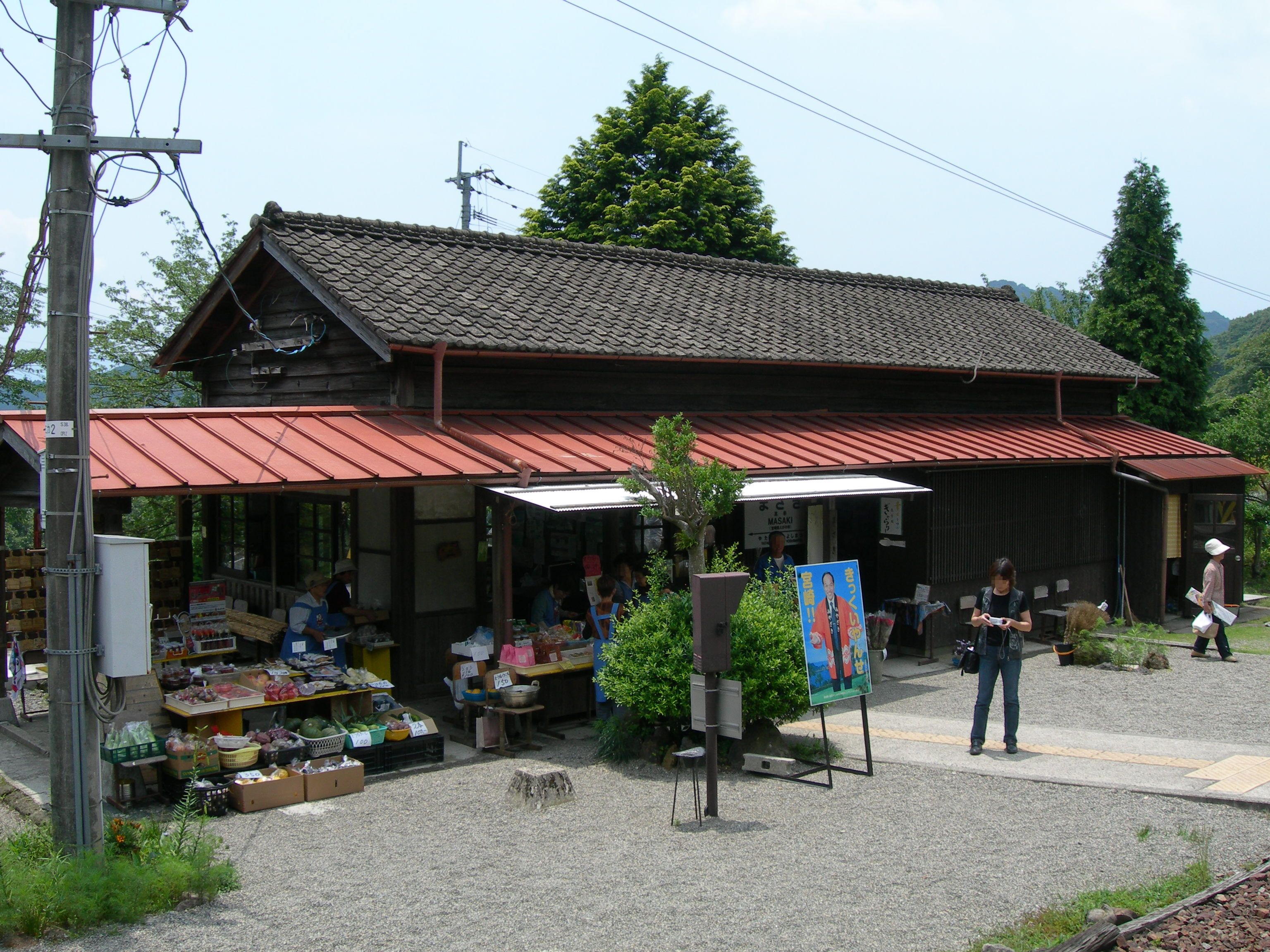 真幸駅線路側